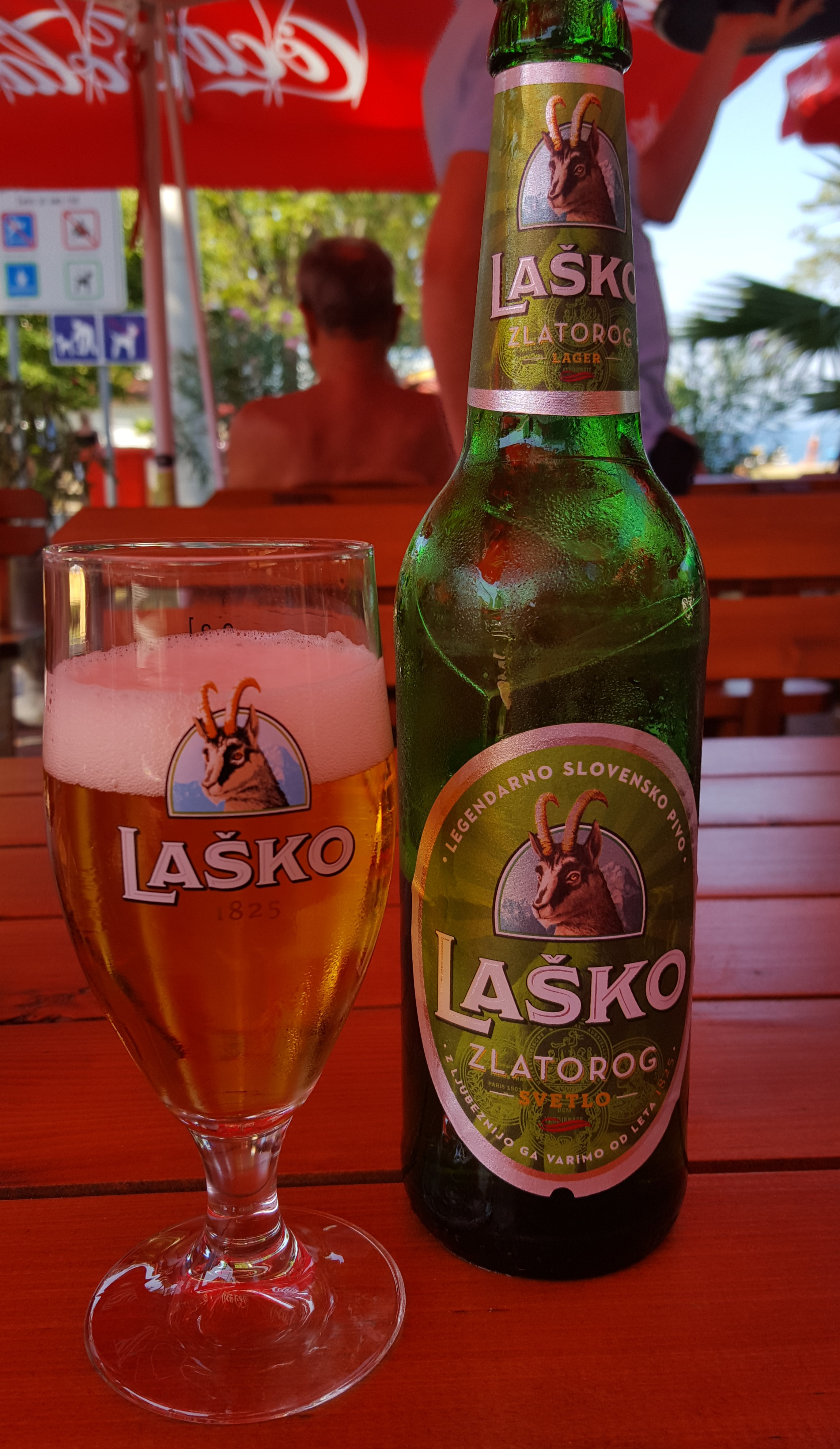 Laško Bier